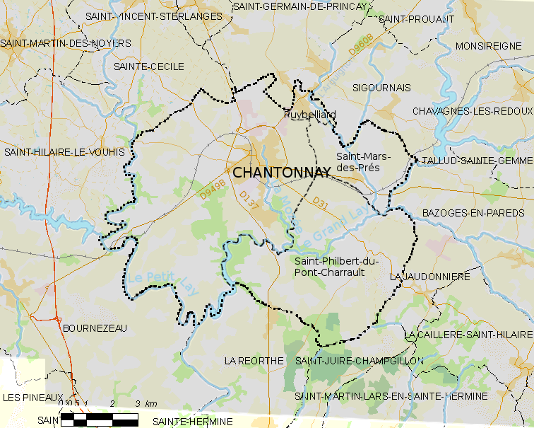 Carte de la commune de Chantonnay (Vendée), avec cours d'eau et limites avec les communes absorbées